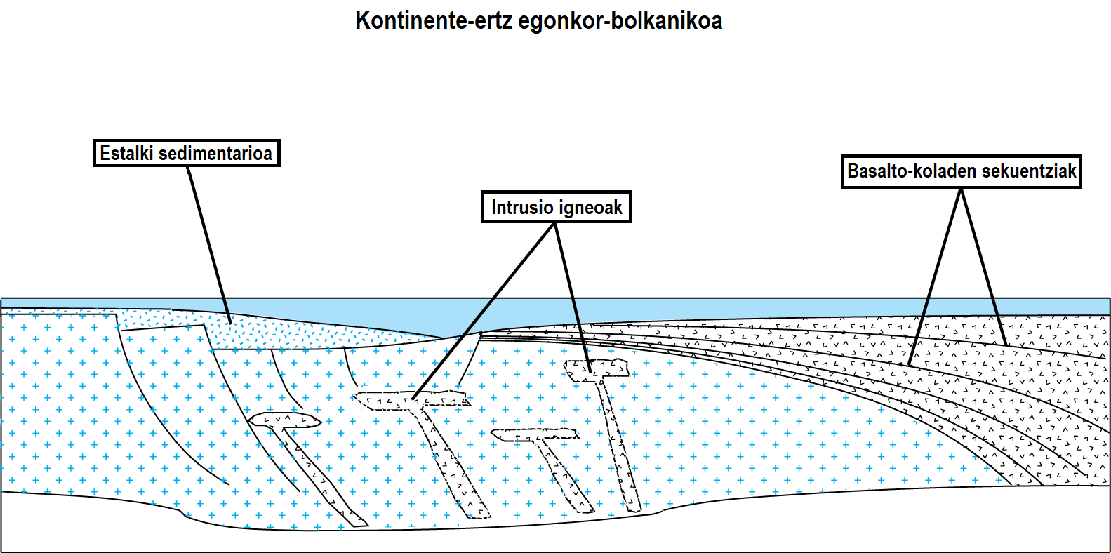 Kontinente-ertz egonkor-bolkaniko baten barne-egitura orokor simplifikatua